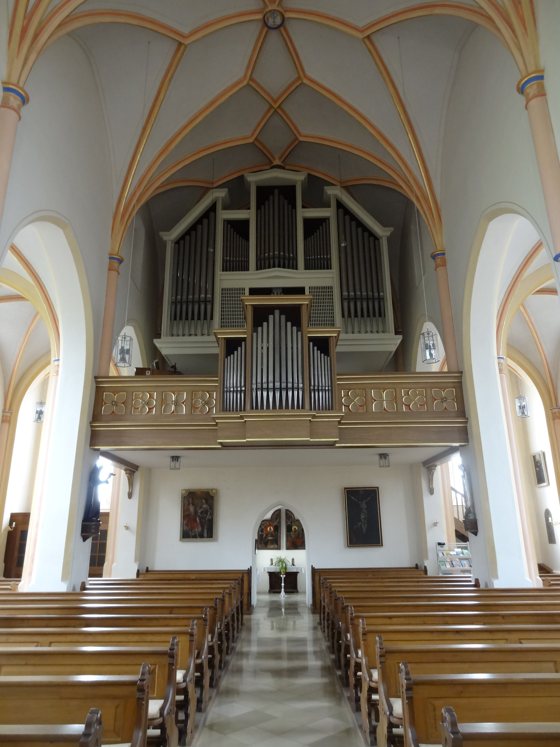 Gegenblick zur Westempore im Langhaus der Pfarrkirche Mariä Himmelfahrt in Bonbruck (Gde. Bodenkirchen, Lkr. Landshut, Bayern)